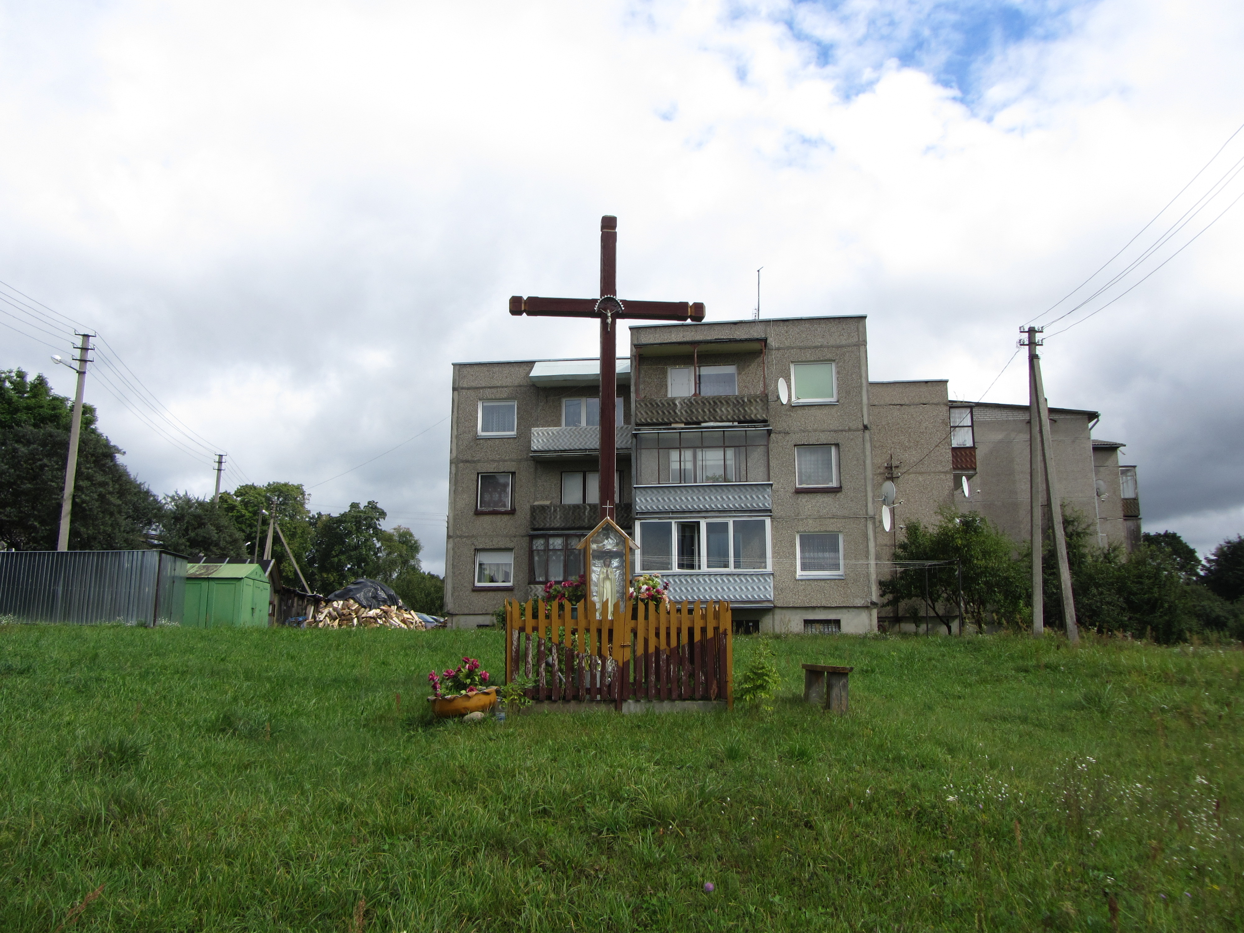 Zavišonys, Lithuania